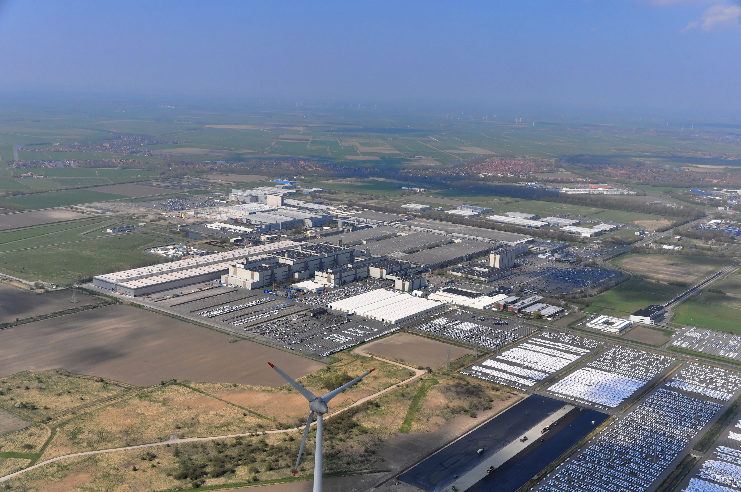 Luftbilder von der Nordseeküste 2013-05